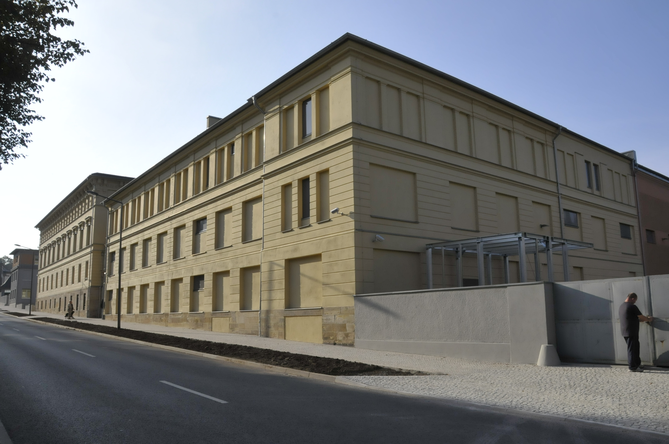 Gotha, Justus-Perthes-Str. 3 bis 9, Perthes-Verlagsgebäude